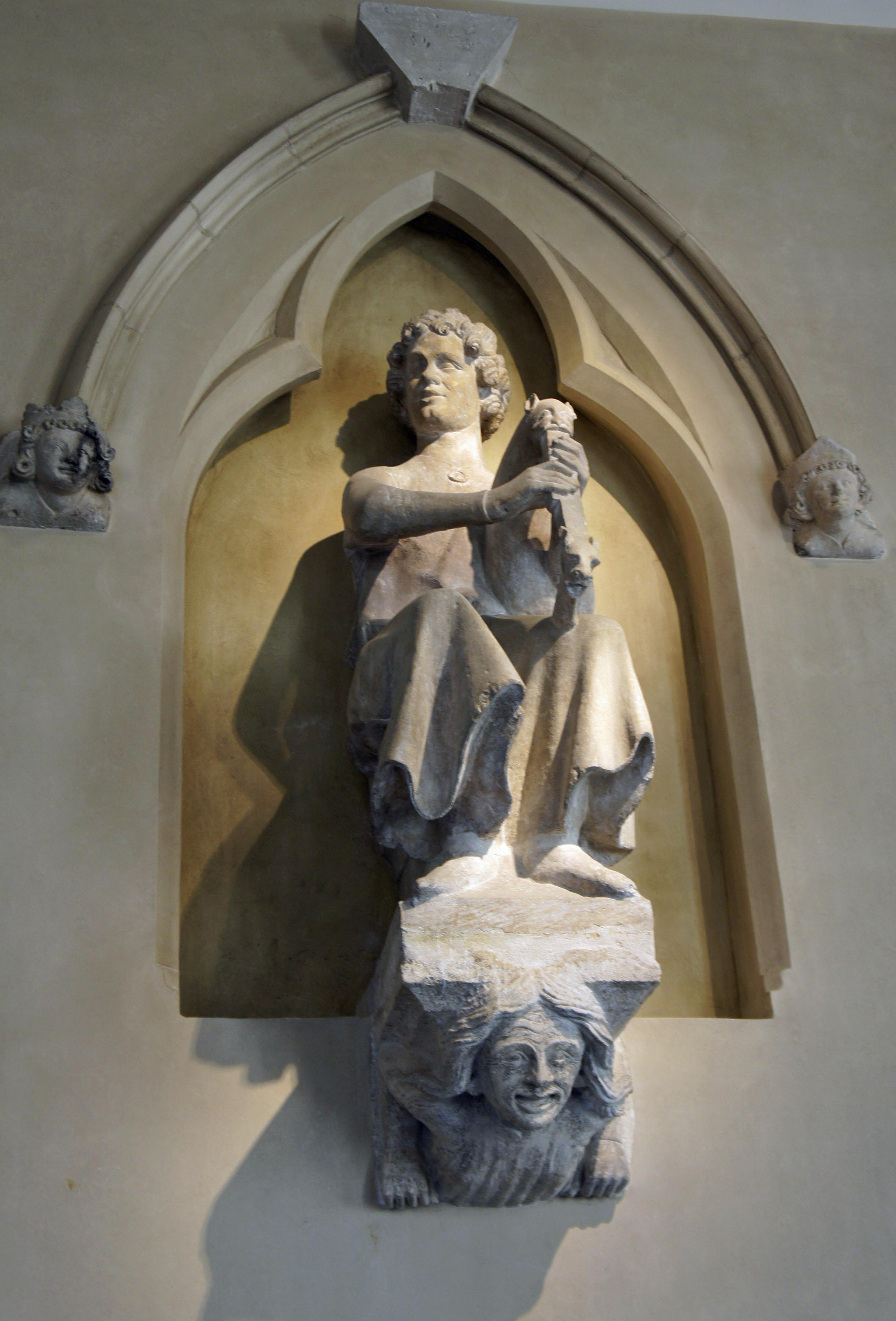 Maison des comtes de champagne le musicien IV mis en la musée st-Rémi après la Première Guerre mondiale. Dit le joueur de cheverette.